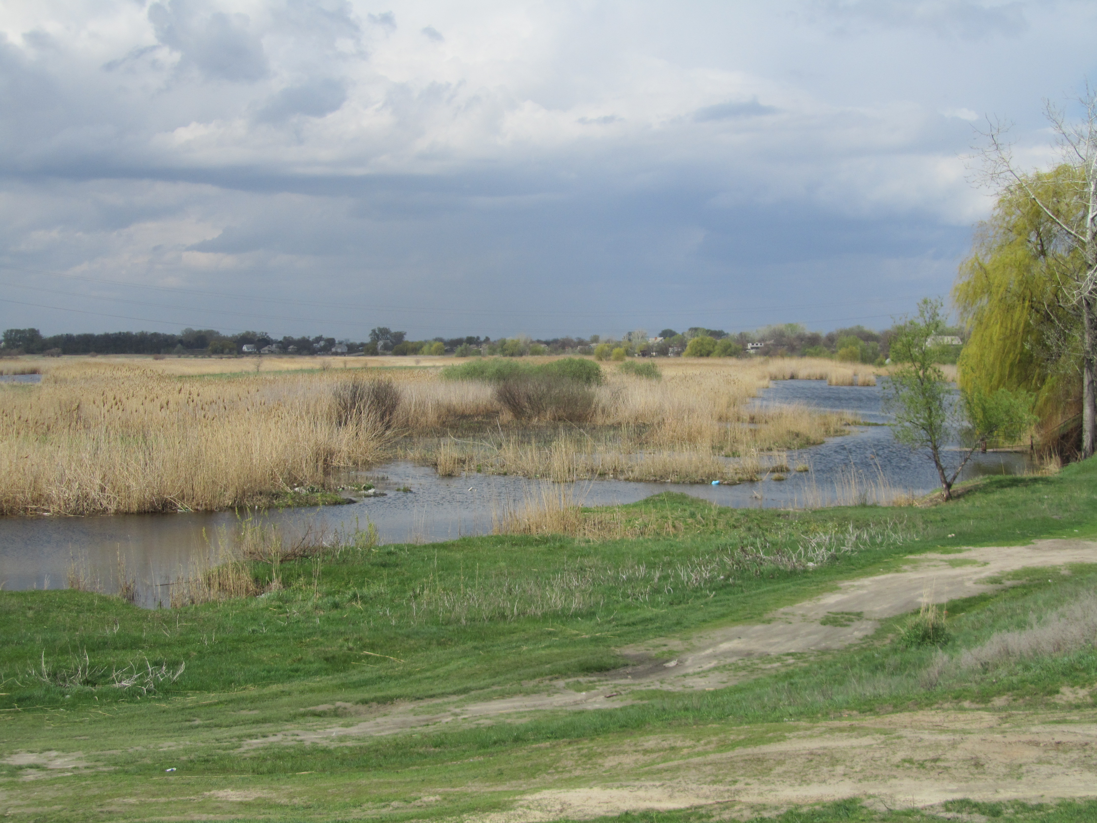 Крива Руда біля Піщаного